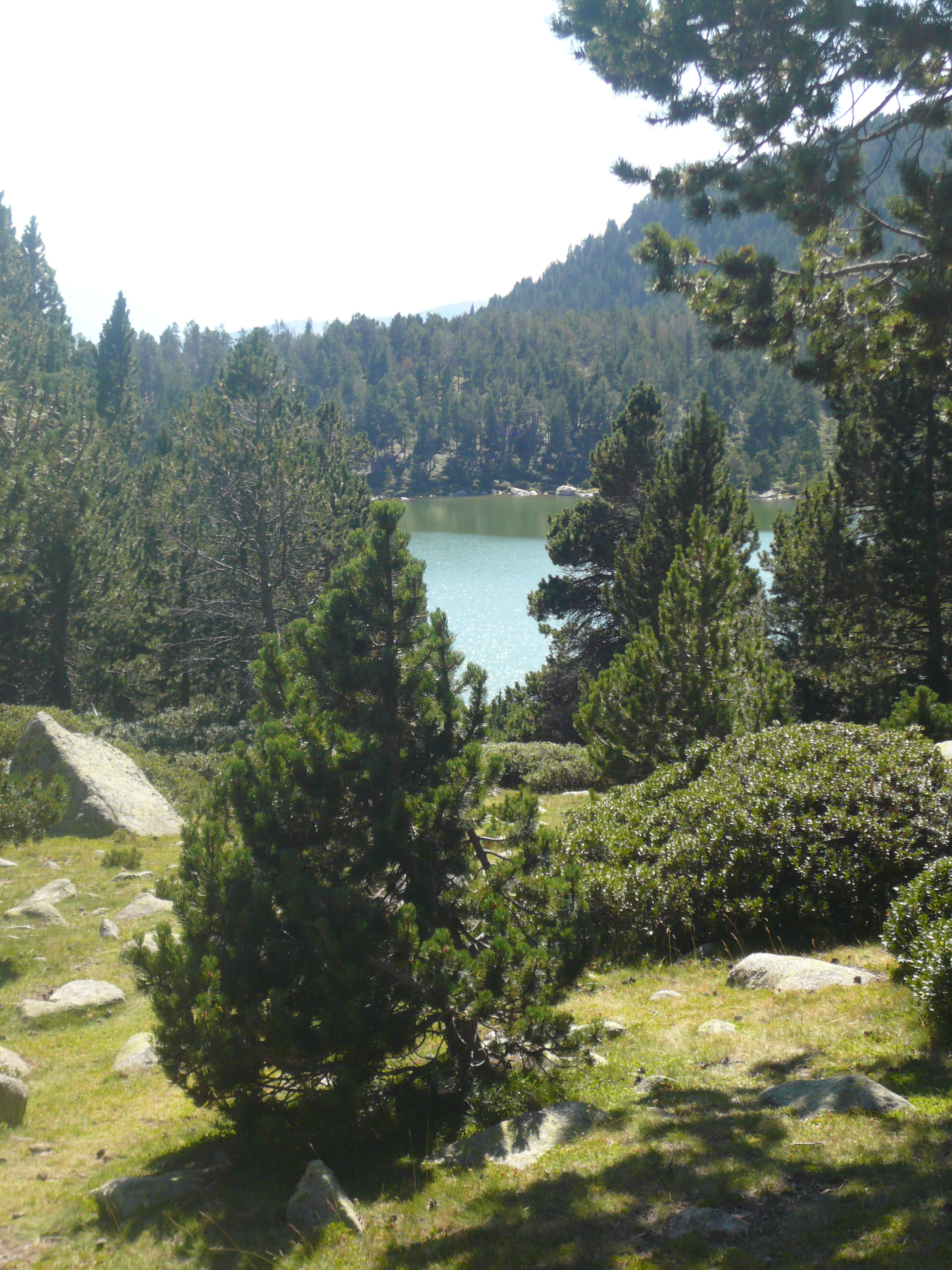 Estany de Malniu (Cerdanya) (Meranges). Estanys i llacs d'alta muntanya. This is a a photo of a wetland in Catalonia, Spain, with id: IZHC-18001504 Object location42° 28′ 19.92″ N, 1° 47′ 29.4″ E